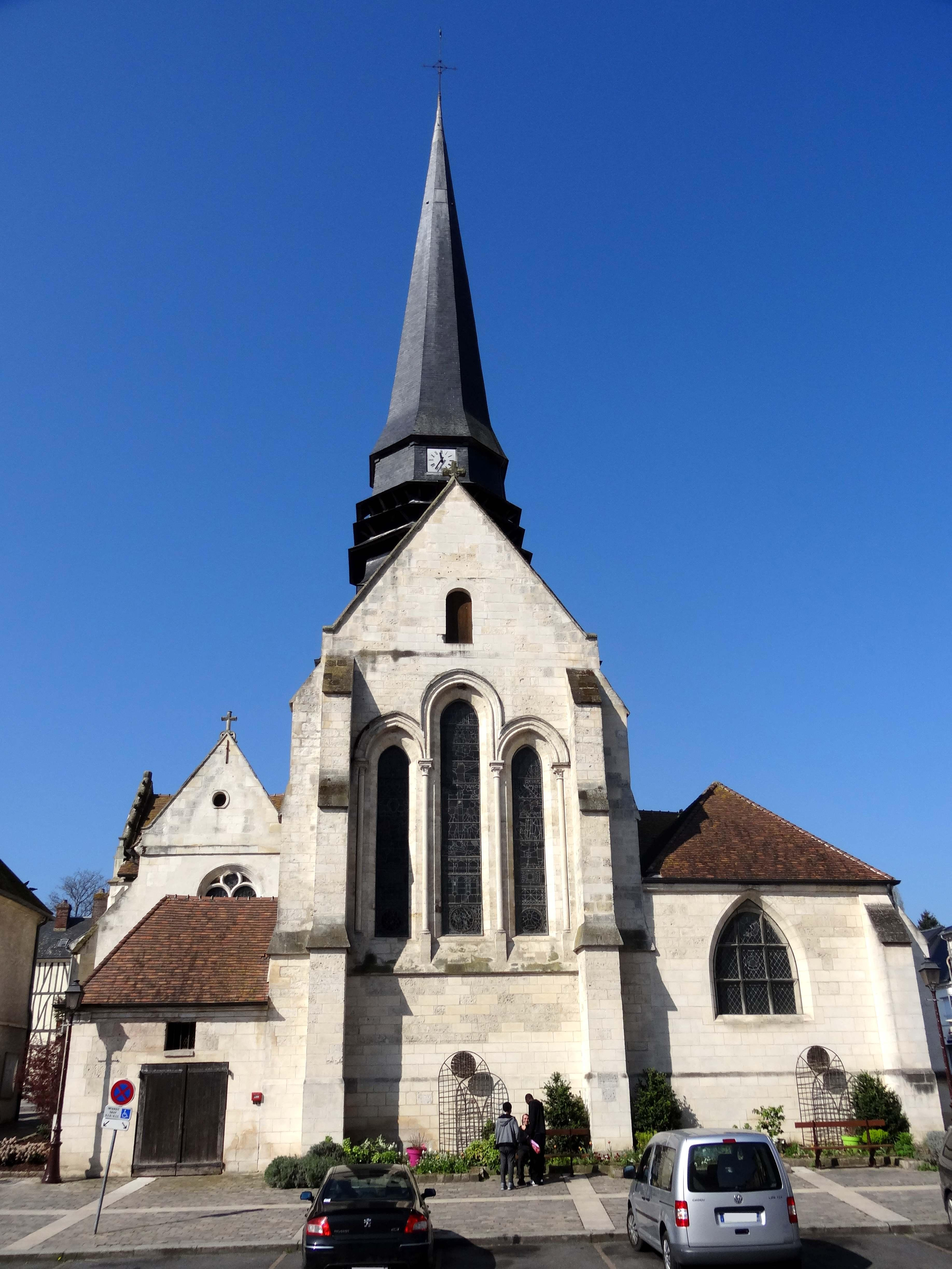 Église Saint-Lucien de Méru - voir titre.